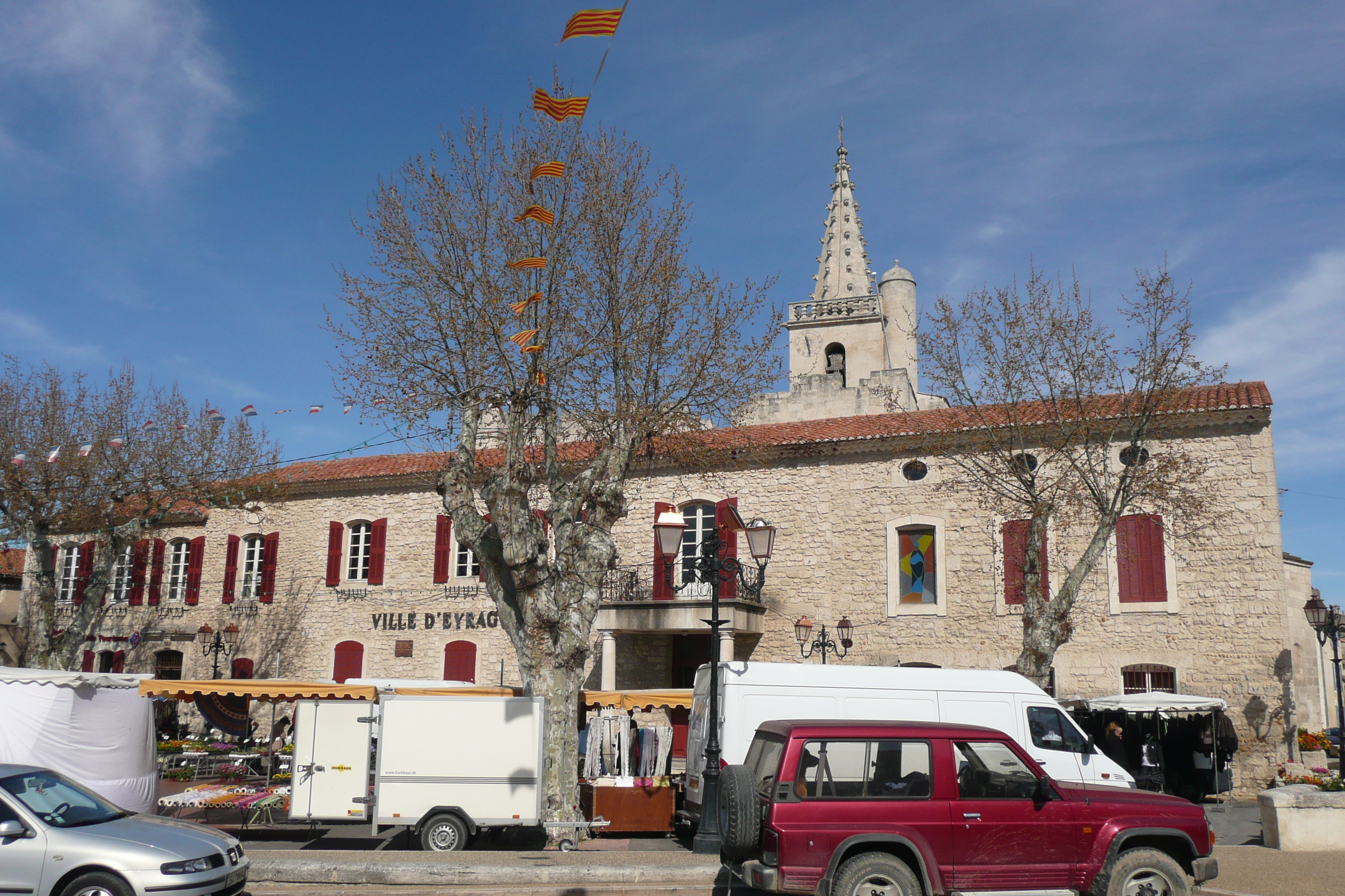 Place à Eyragues.